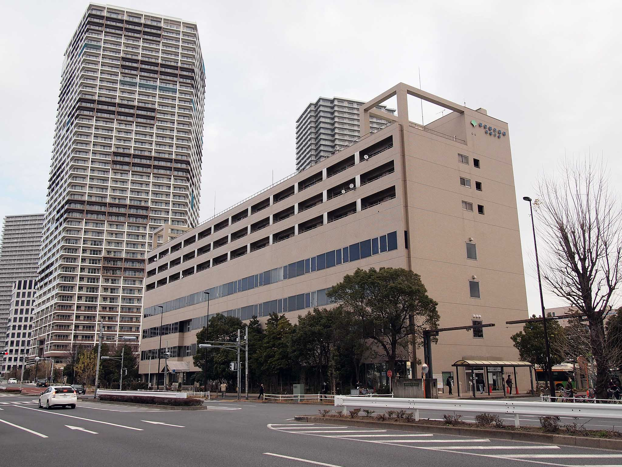 東京都交通局東雲庁舎を東雲駅・首都高湾岸線側から望む。低層部は深川自動車営業所と交通局研修所、高層部には職員住宅の東雲寮が設置される。